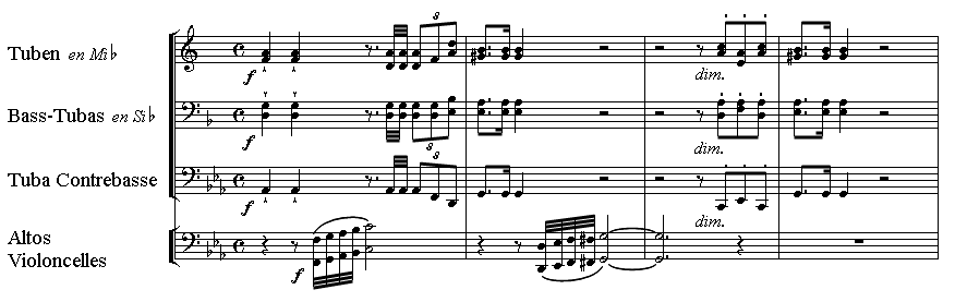 Wagner - thème de Hunding